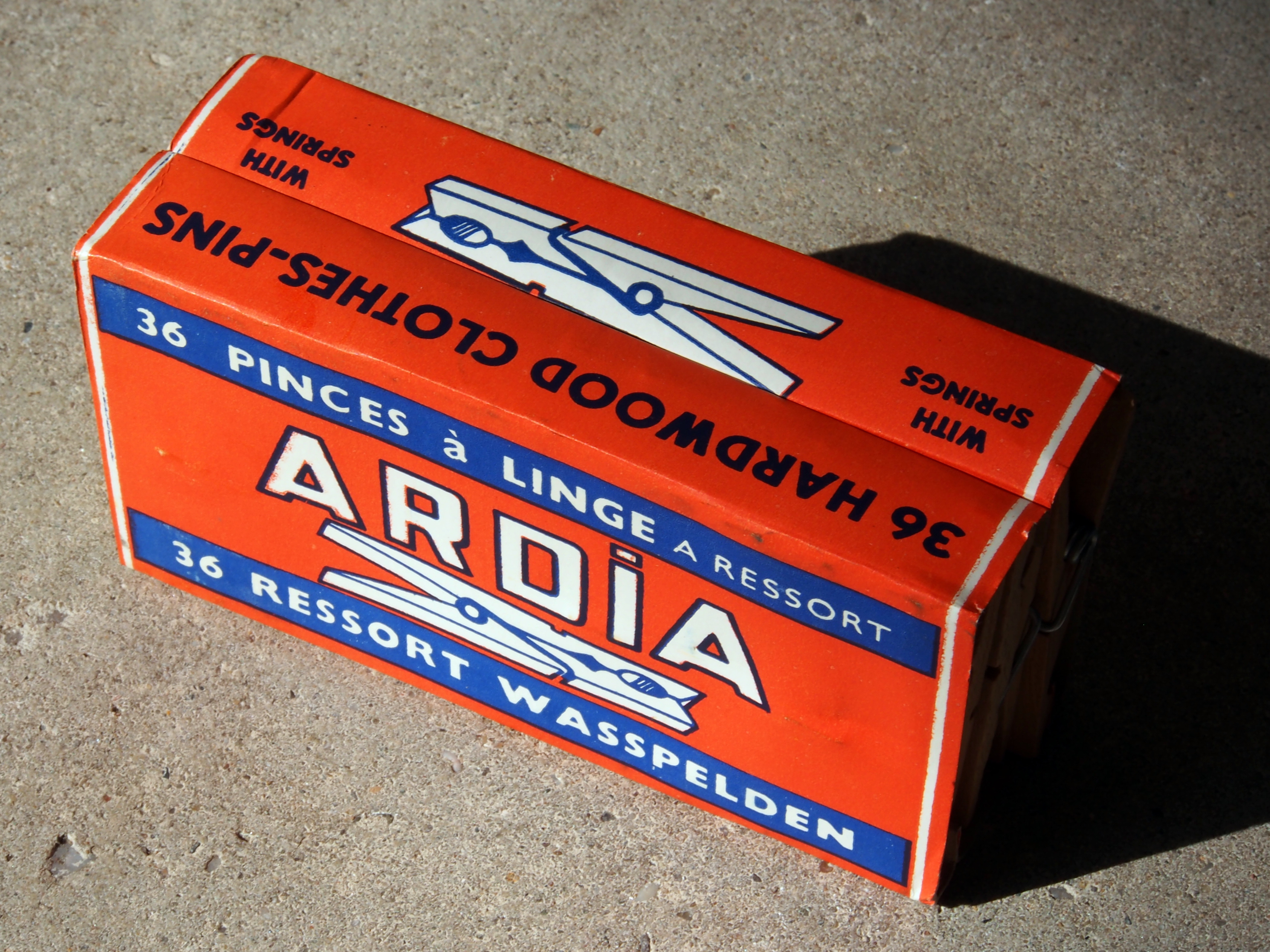 Ardia wasknijpers.